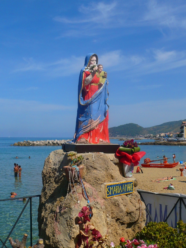 il santuario di s.maria a mare a santa maria di castellabate(salerno)